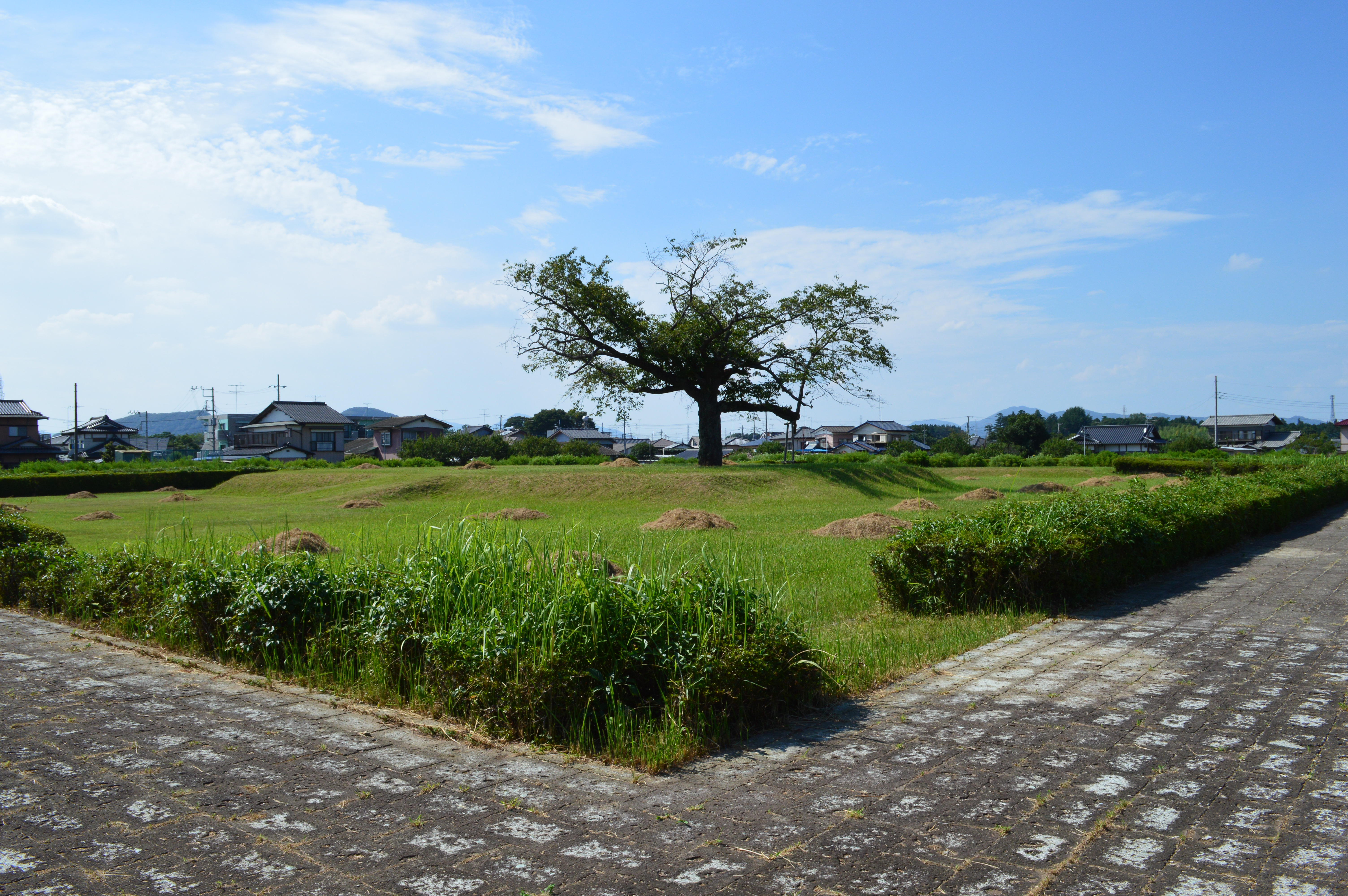 常陸国分尼寺跡 回廊と講堂